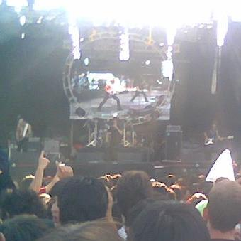 La banda de rock Pier en el cosquin rock 2008